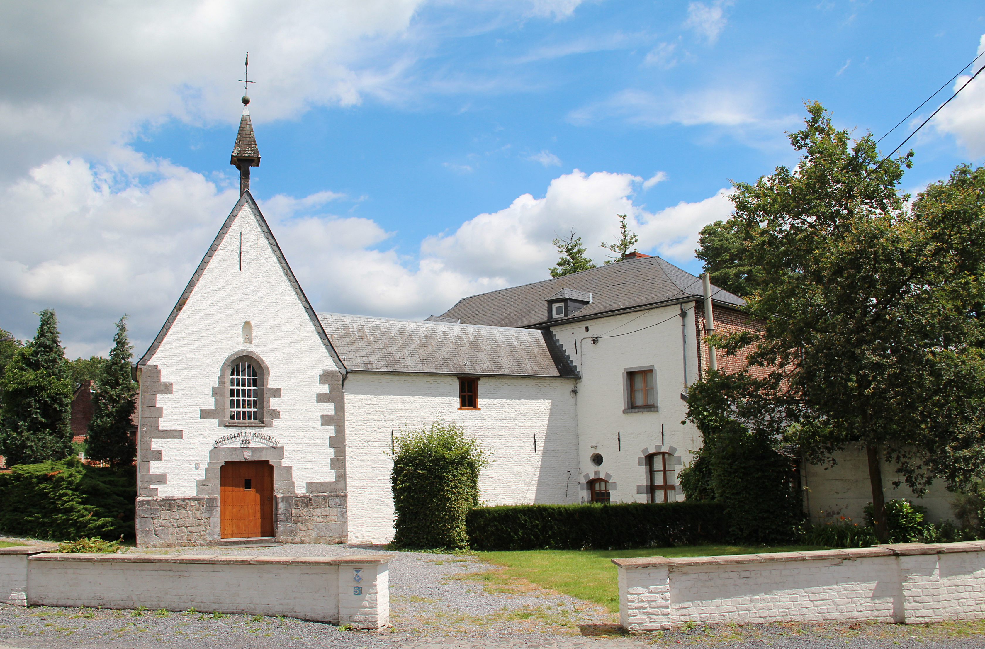 Ghlin (Belgique), chapelle Notre-Dame du Moulineau (XVIème siècle).